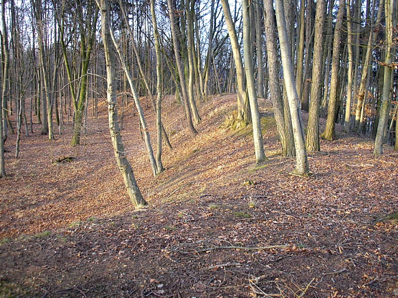 Burgstall Sand (Todtenweis, Landkreis Aichach-Friedberg, Bayerisch-Schwaben). Der nordöstliche Wallzug. Eigene Aufnahme, Jan. 2008 / Former Sand castle (Todtenweis, Landkreis Aichach-Friedberg, Bavaria, Germany). The north eastern earthworks. Own photo, Jan. 2008